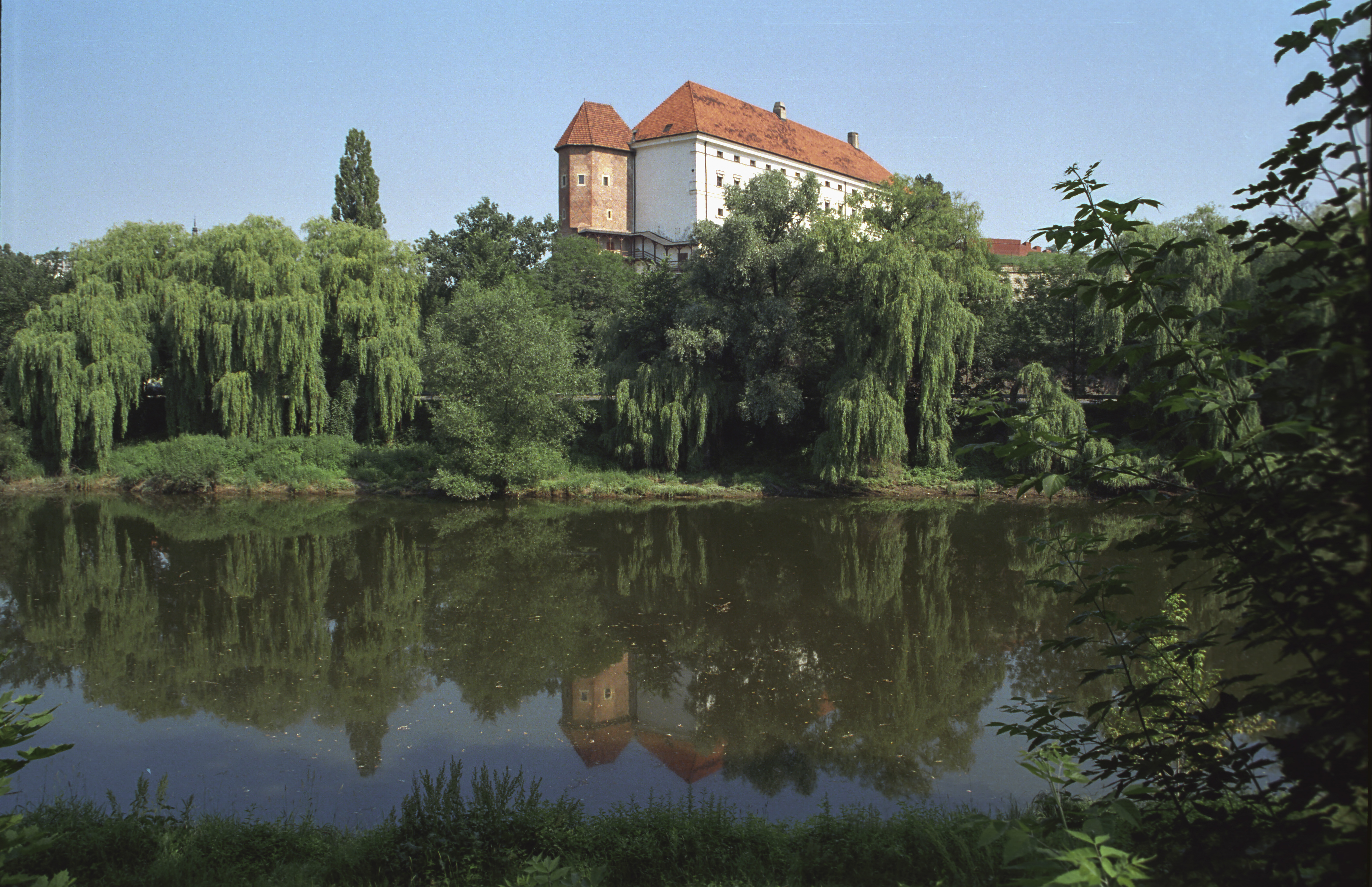 Poland, Sandomierz Castle